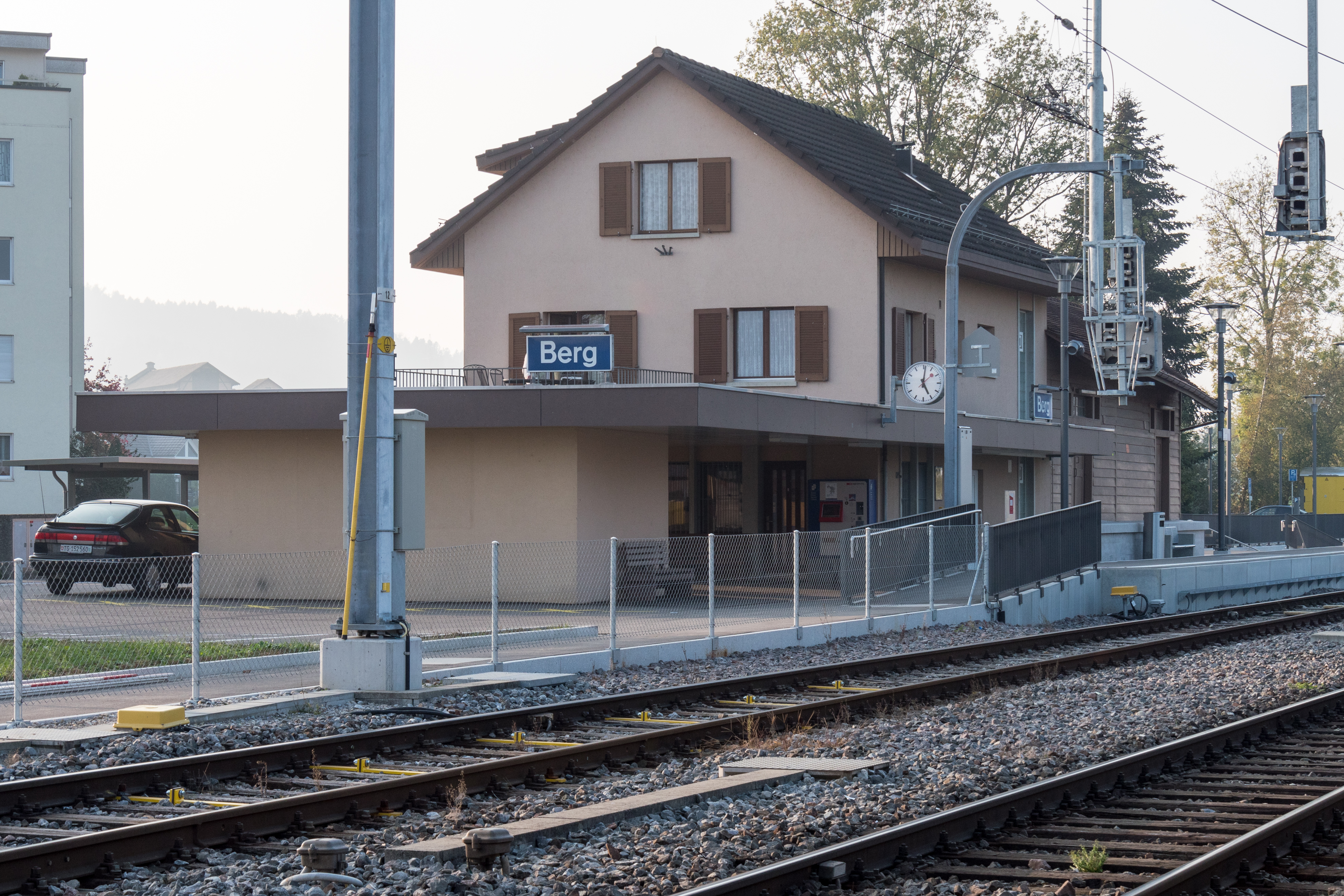 Bahnhof Berg an der Linie Weinfelden - Konstanz